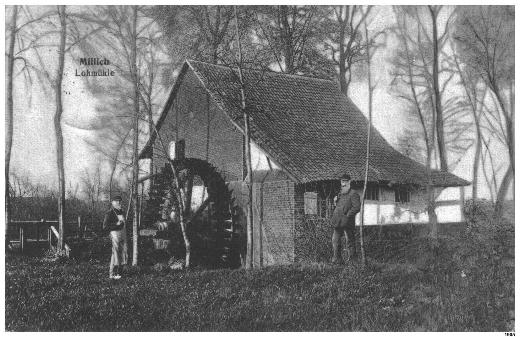 Postkarte der Millicher Lohmühle um 1900, Hückelhoven, Nordrhein-Westfalen, Deutschland